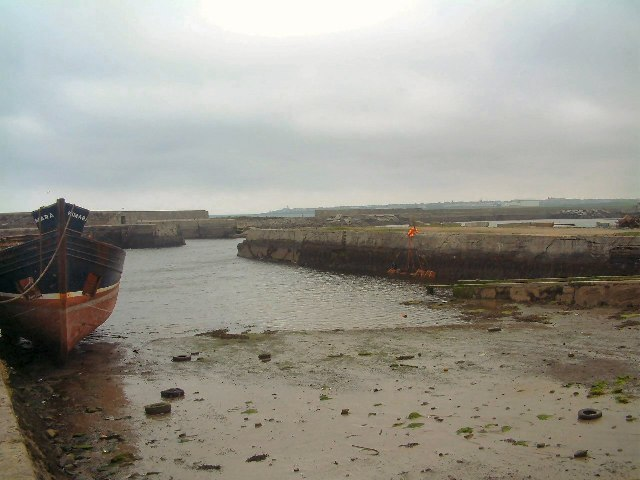 Sandhaven Harbour, Sandhaven, Aberdeenshire